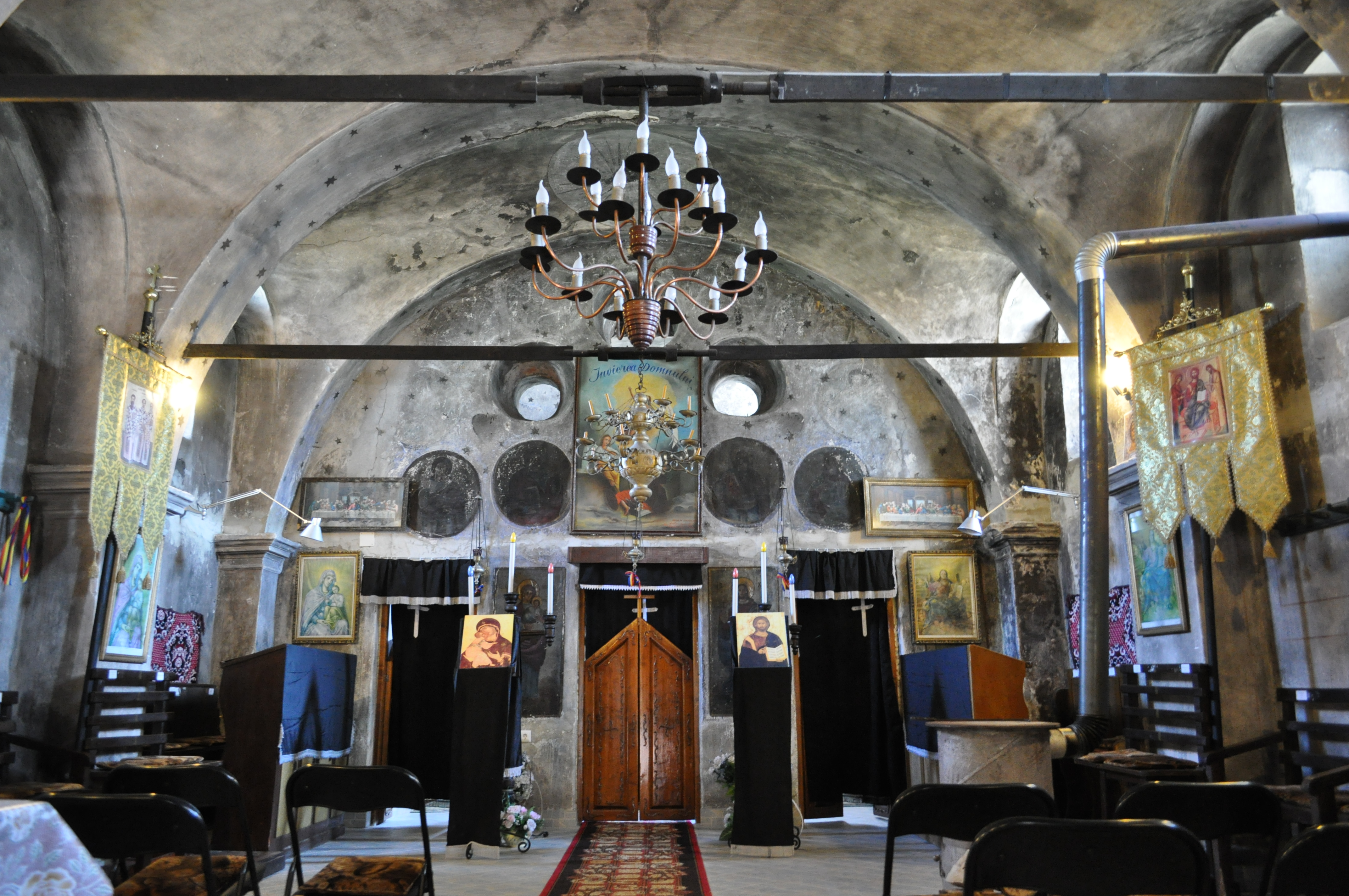 Biserica "Buna Vestire", sat ROŞCANI; comuna DOBRA